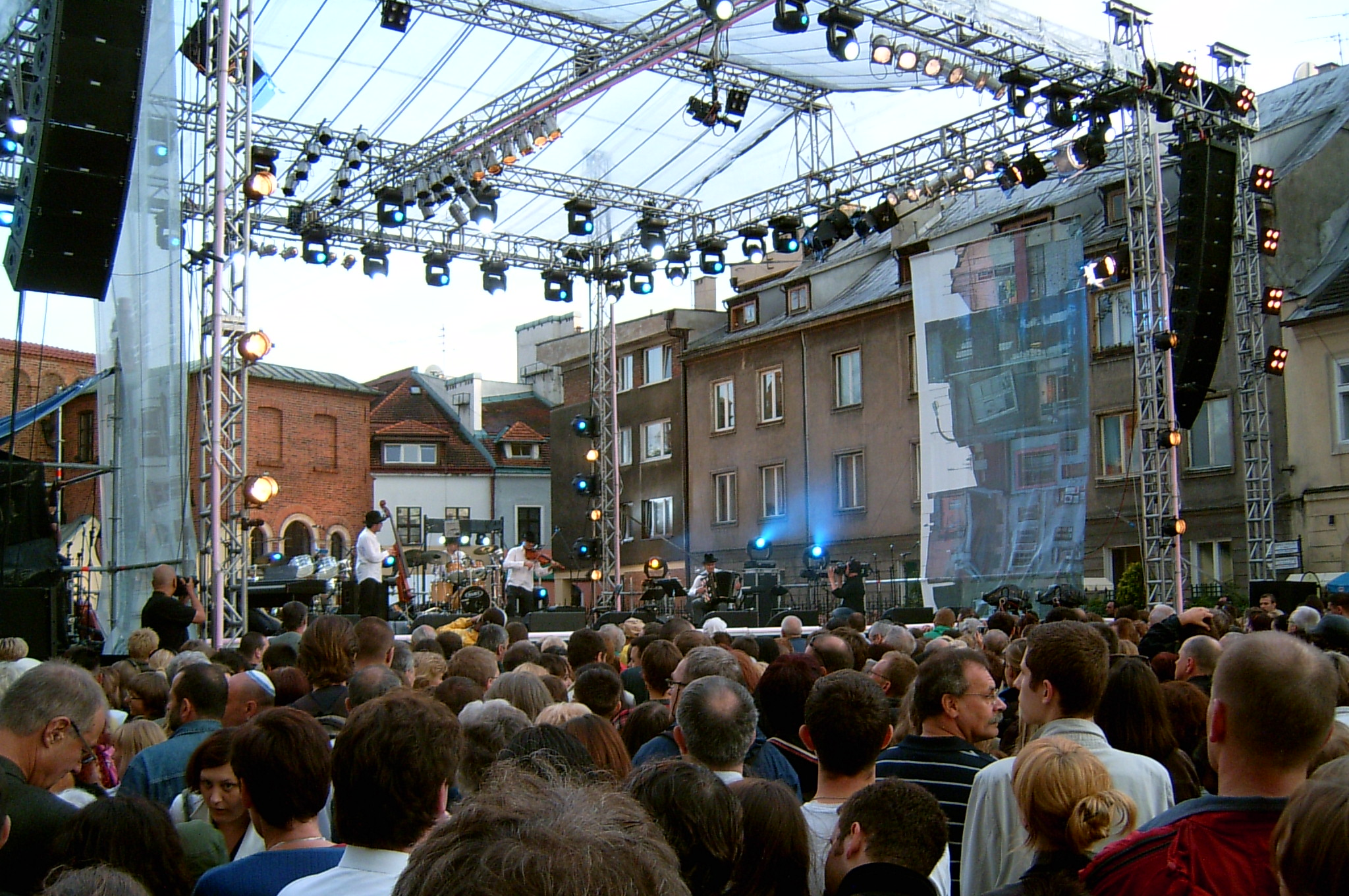 Kraków, Poland